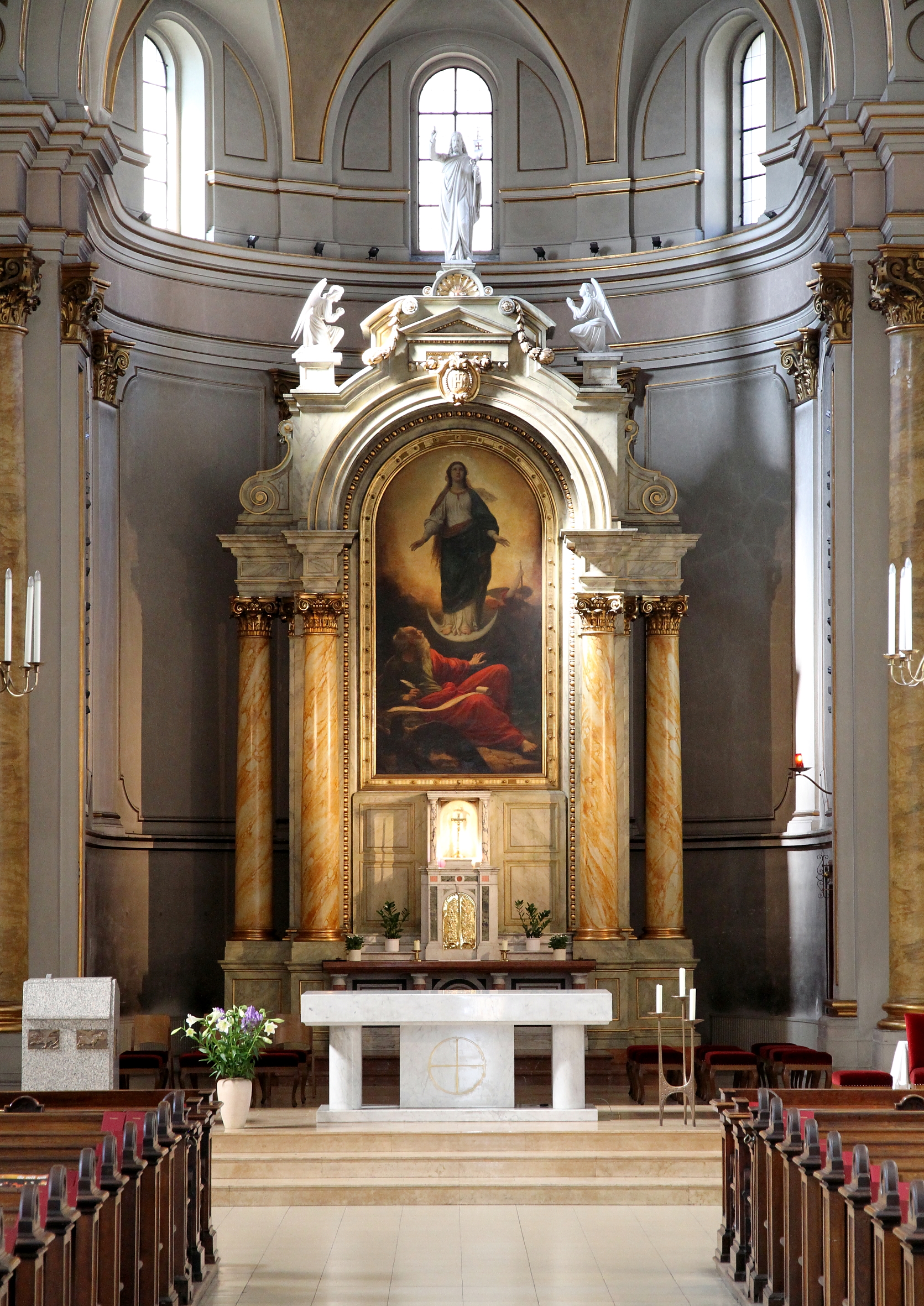 Hochaltar der katholischen Pfarrkirche hl. Johann Evangelist am Keplerplatz in Wien.